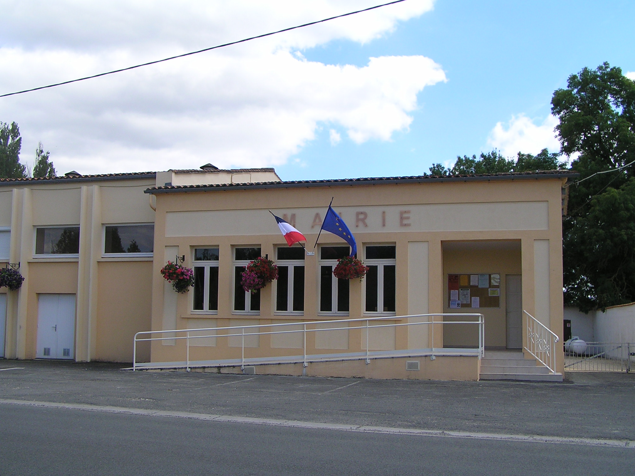 mairie de Guimps